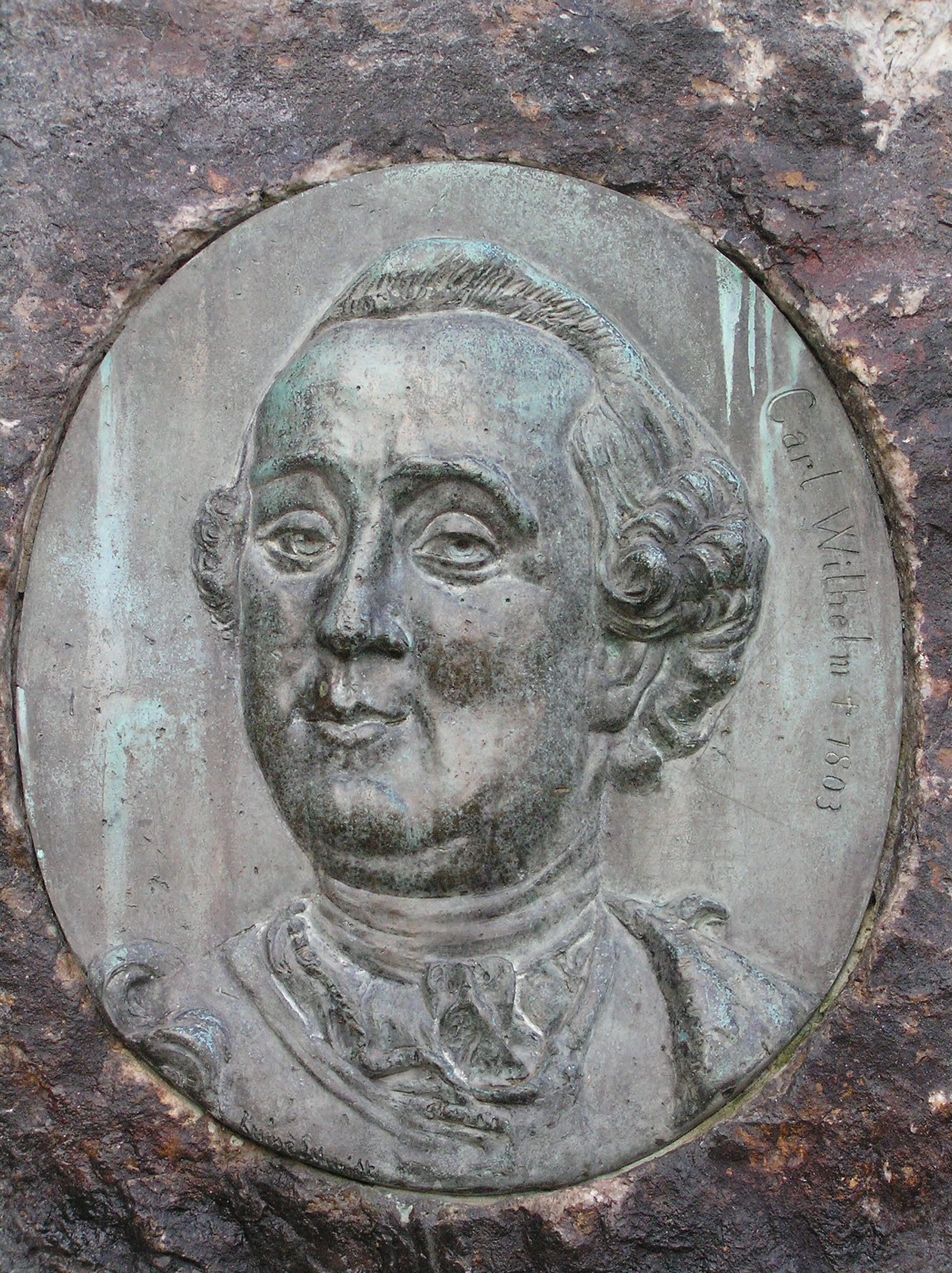 Carl Wilhelm von Usingen Nassau (Denkmal im Usinger Schlosspark)